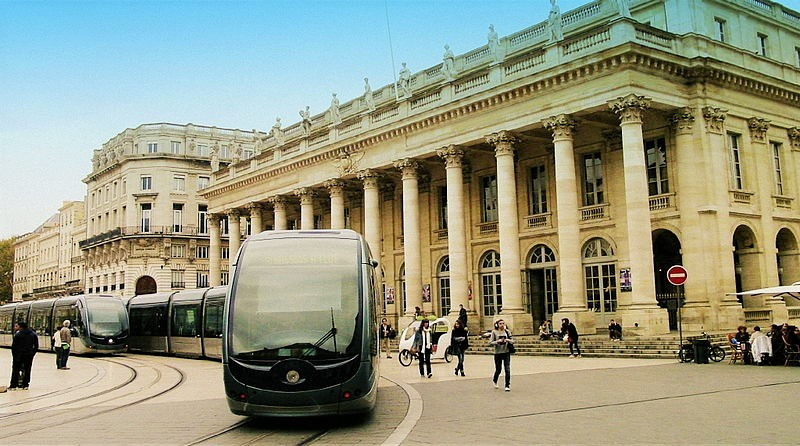 Les Trams à Bordeaux sont magnifiques!